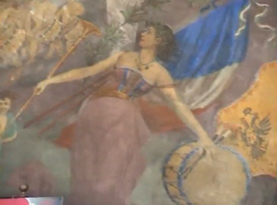 Dipinto di Giacomo Campi a Casa Giacobbe - Magenta (MI) - Italy